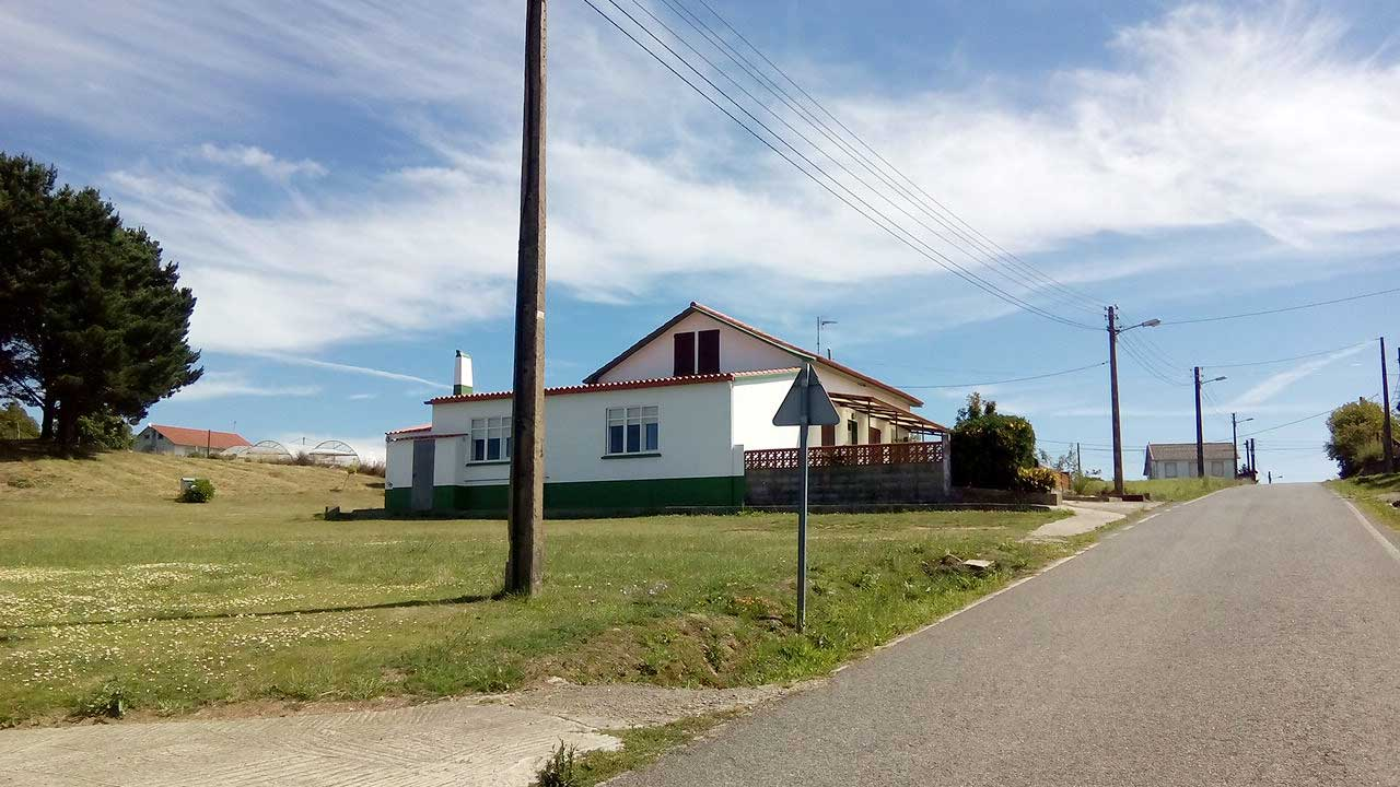 Vista da Modia, O Val.